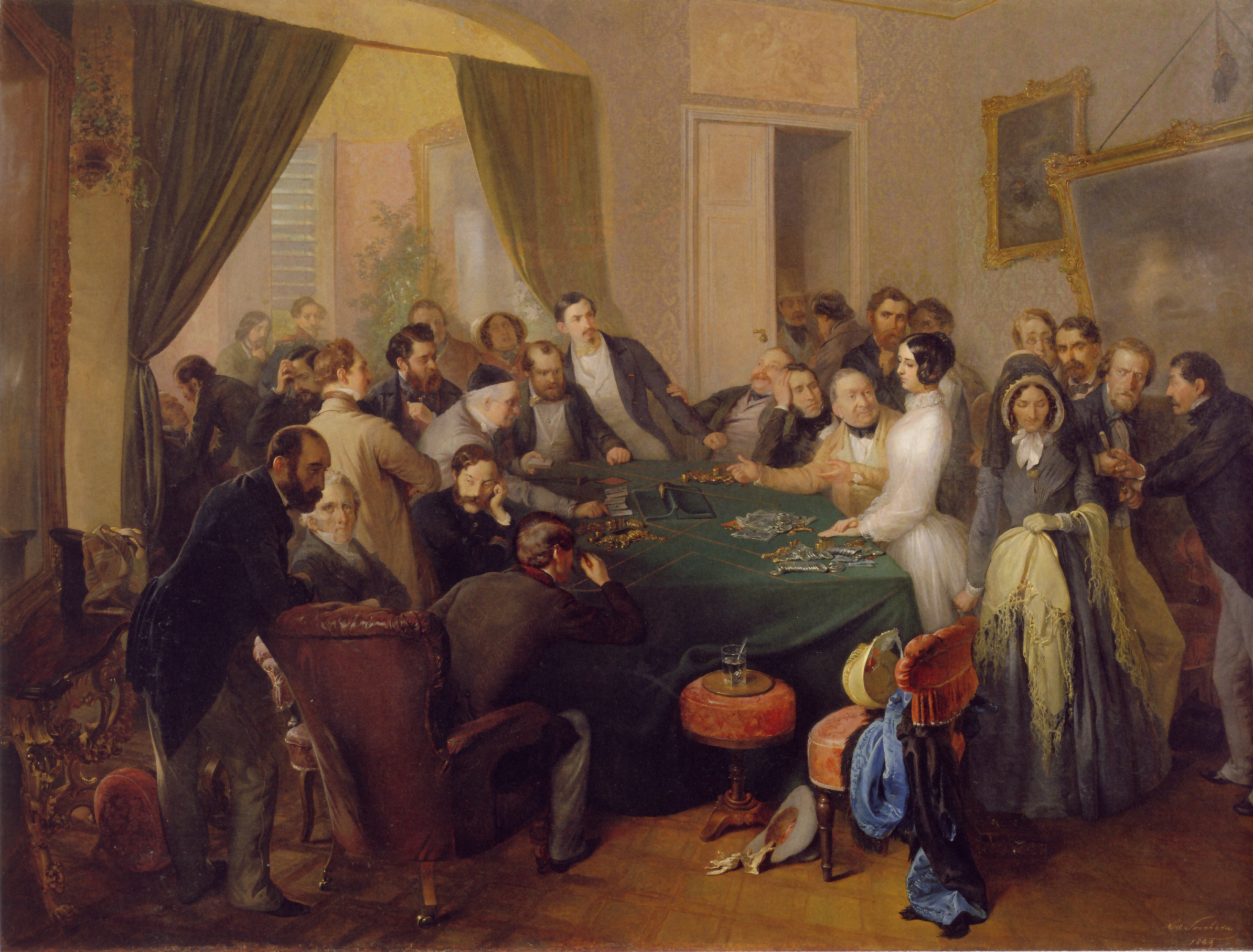 Va banque oder Glücksspiel